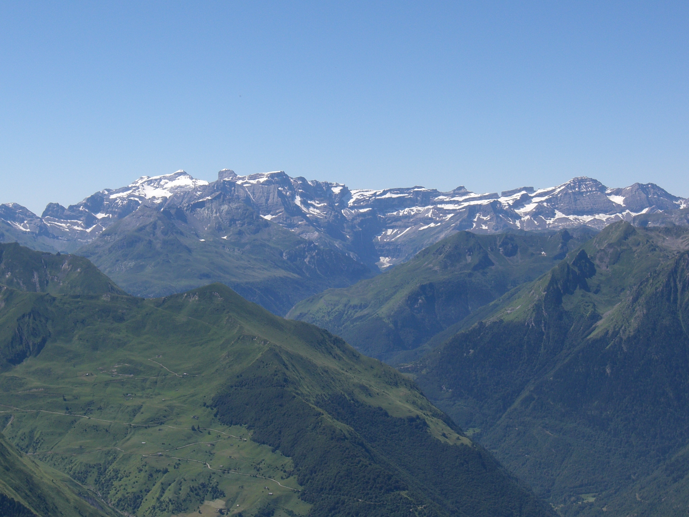 Le massif du Mont-Perdu depuis le Soum de Nère